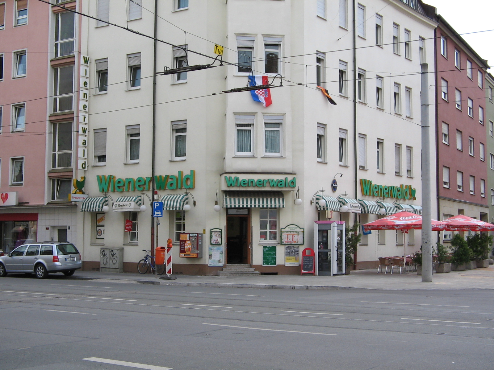 Wienerwald-Restaurant in Nuremberg, Germany